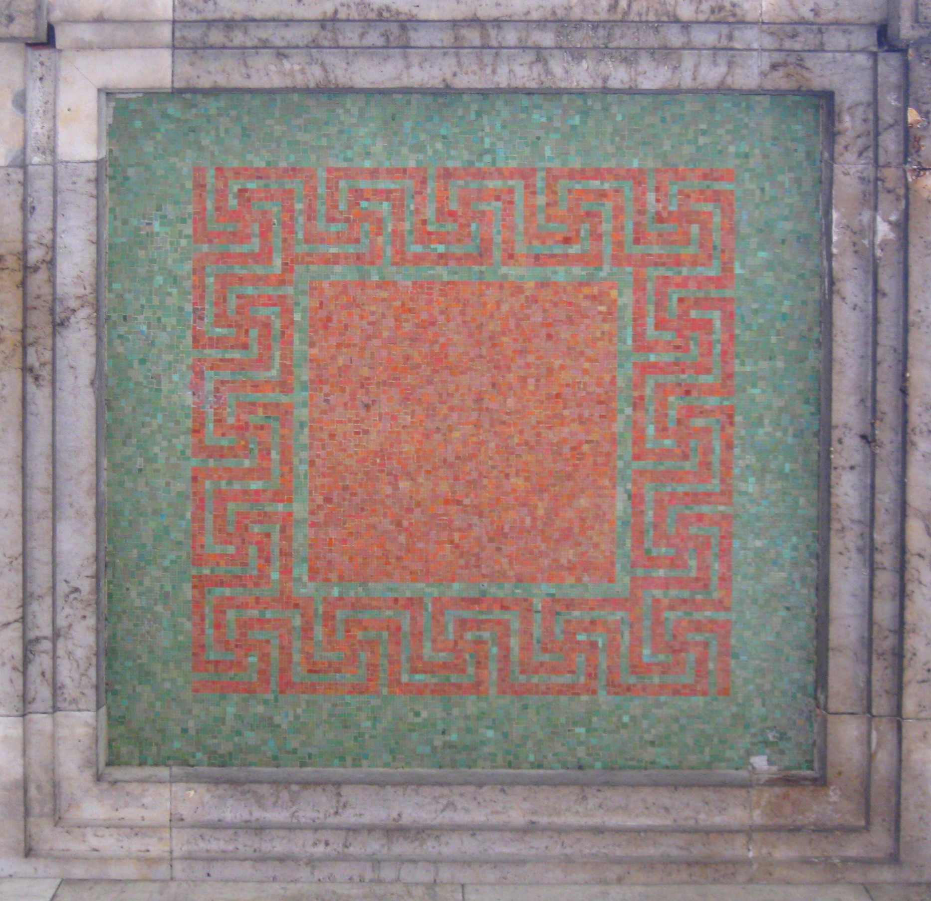 Prinzregentenstraße 1; Haus der Kunst, ehem. Haus der Deutschen Kunst, monumentaler, neuklassizistischer Ausstellungsbau, 1933–37 von Paul Ludwig Troost; Freitreppe 1971 abgetragen.